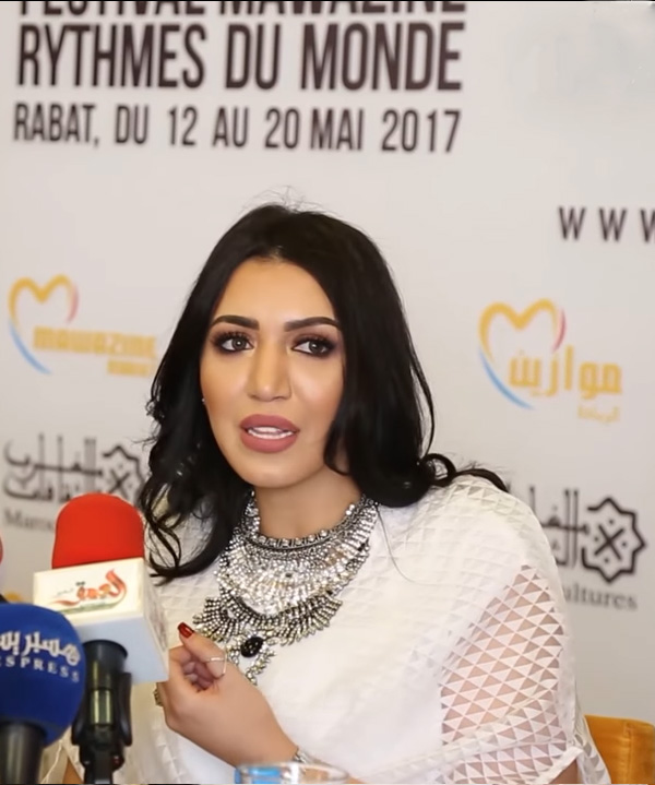 أسماء المنور أثناء لقاء صحفي في مهرجان موازين، 2017